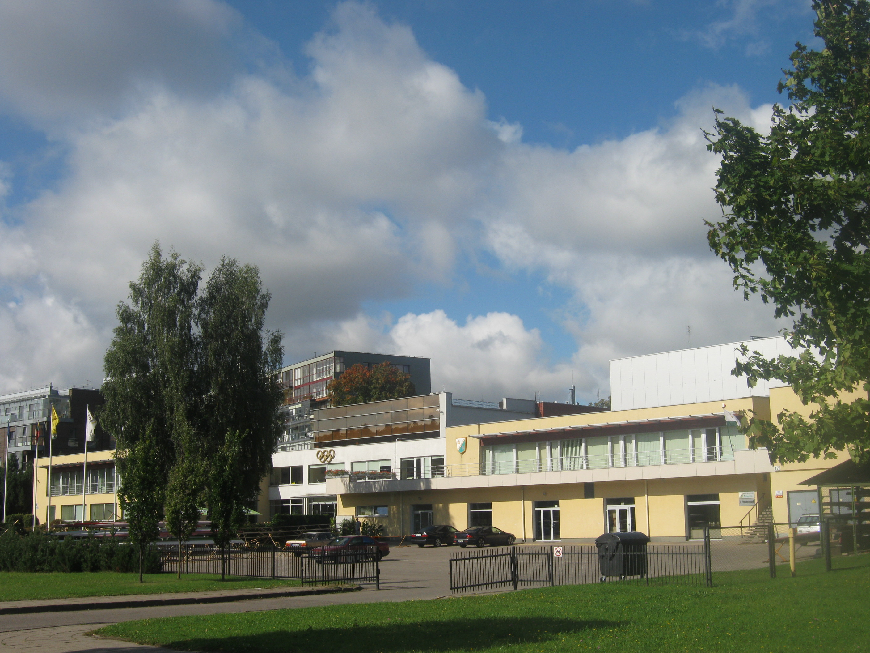 Lietuvos tautinis olimpinis komitetas